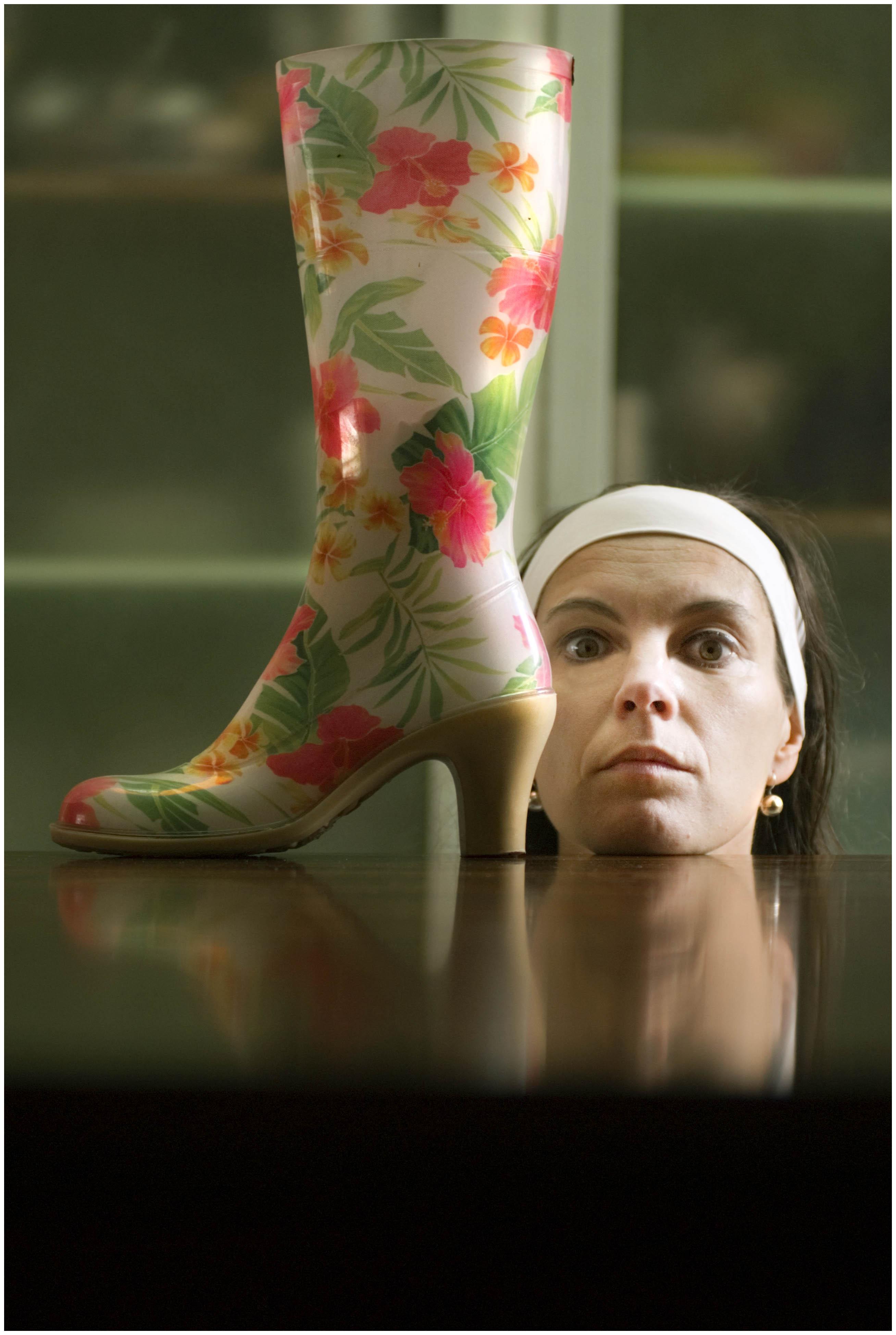 Gerda Dendooven, Belgisch beeldend kunstenaar en illustrator.